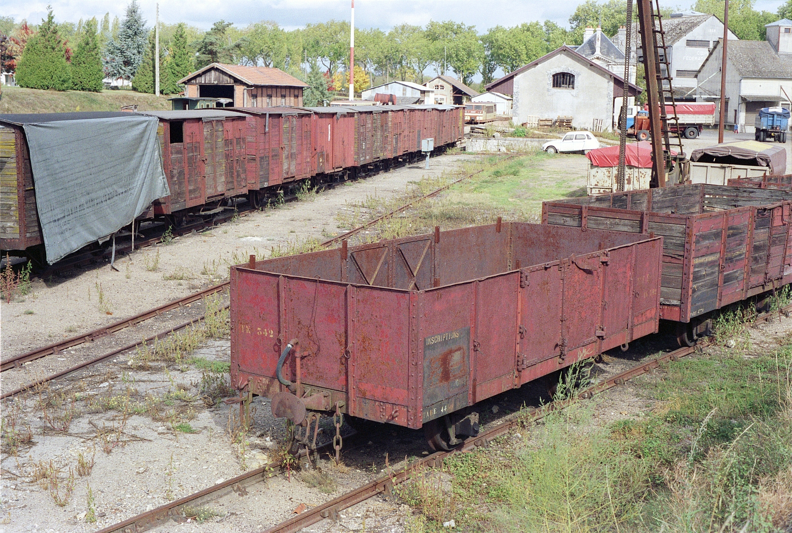 Wagons garés en gare de Valençay le 14 ocotbre 1989.